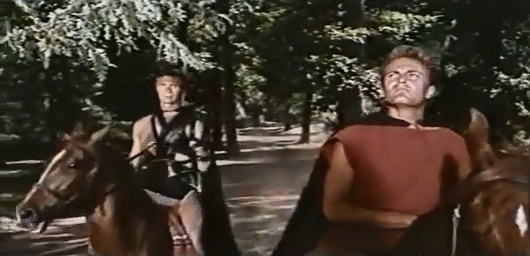 La vendetta di Spartacus (1964) de Michele Lupo